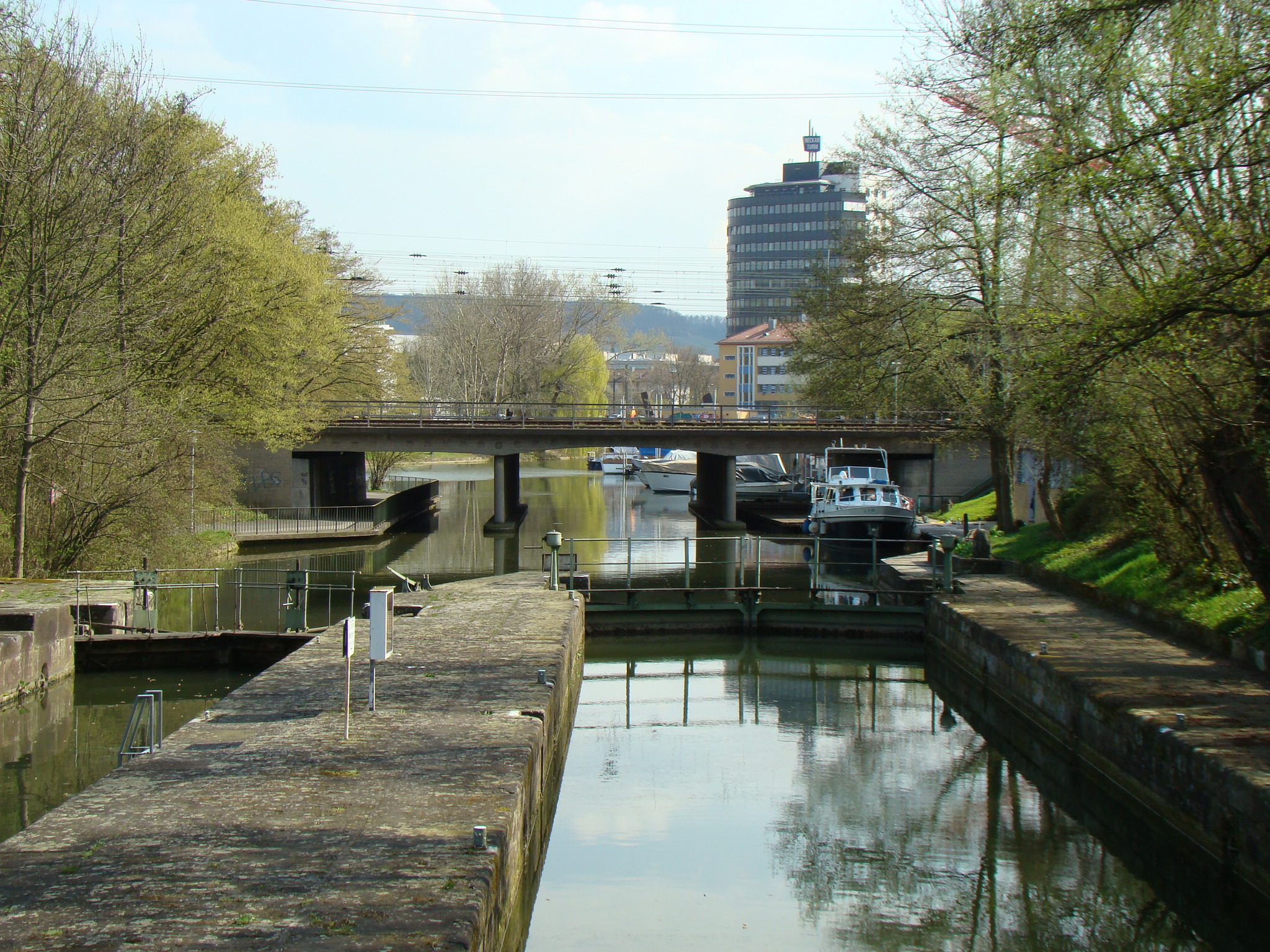 Wilhelmskanal in Heilbronn, April 2009